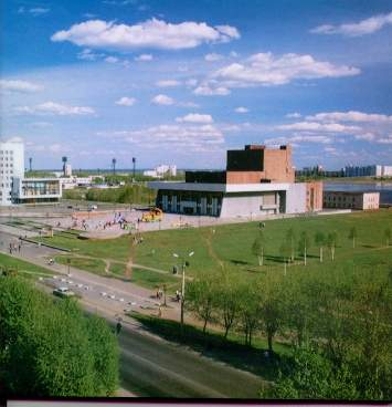 for severodvinsk